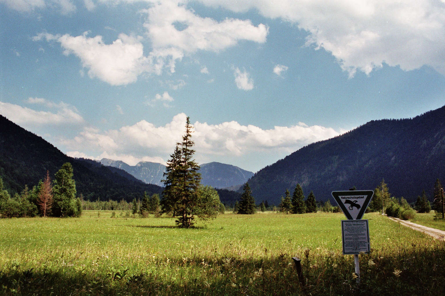 Weidmoos, Blick Richtung Ettal